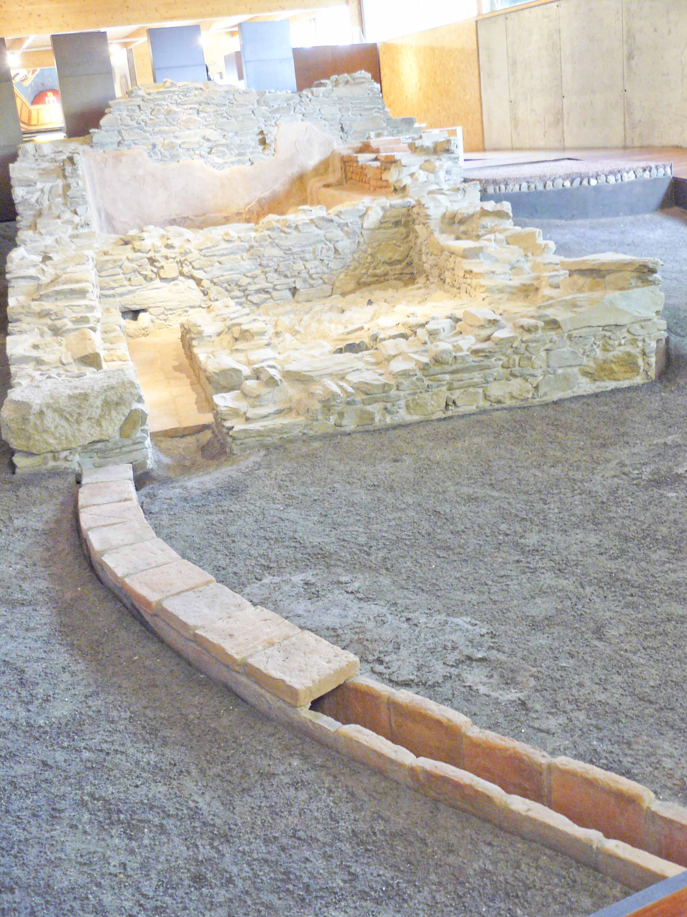 Balneum e letrinae da Vila romana de Cambre